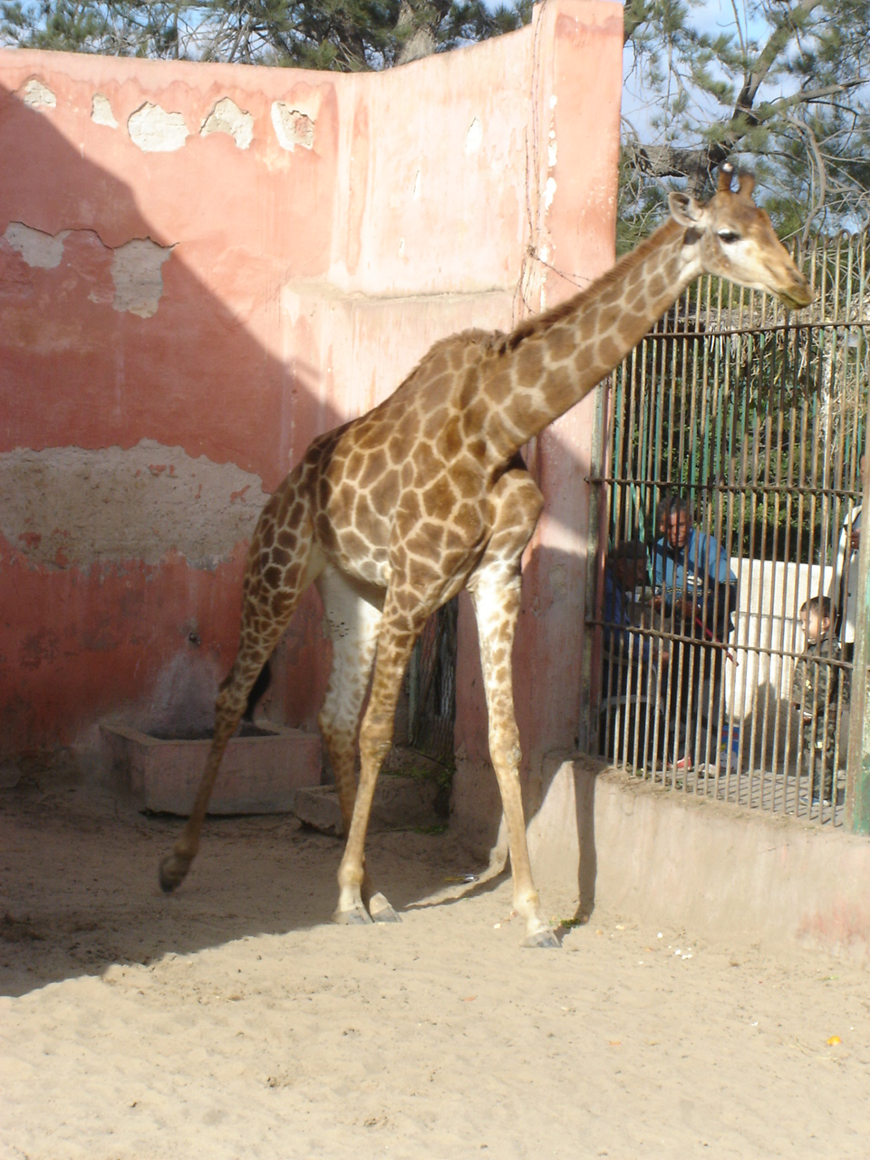 A giraffe at Alexandria Zoo